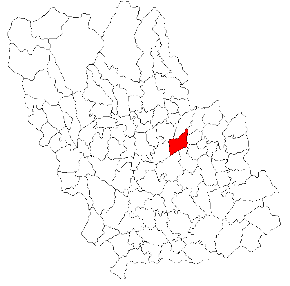 Categorie:Hărţi ale judeţului Prahova